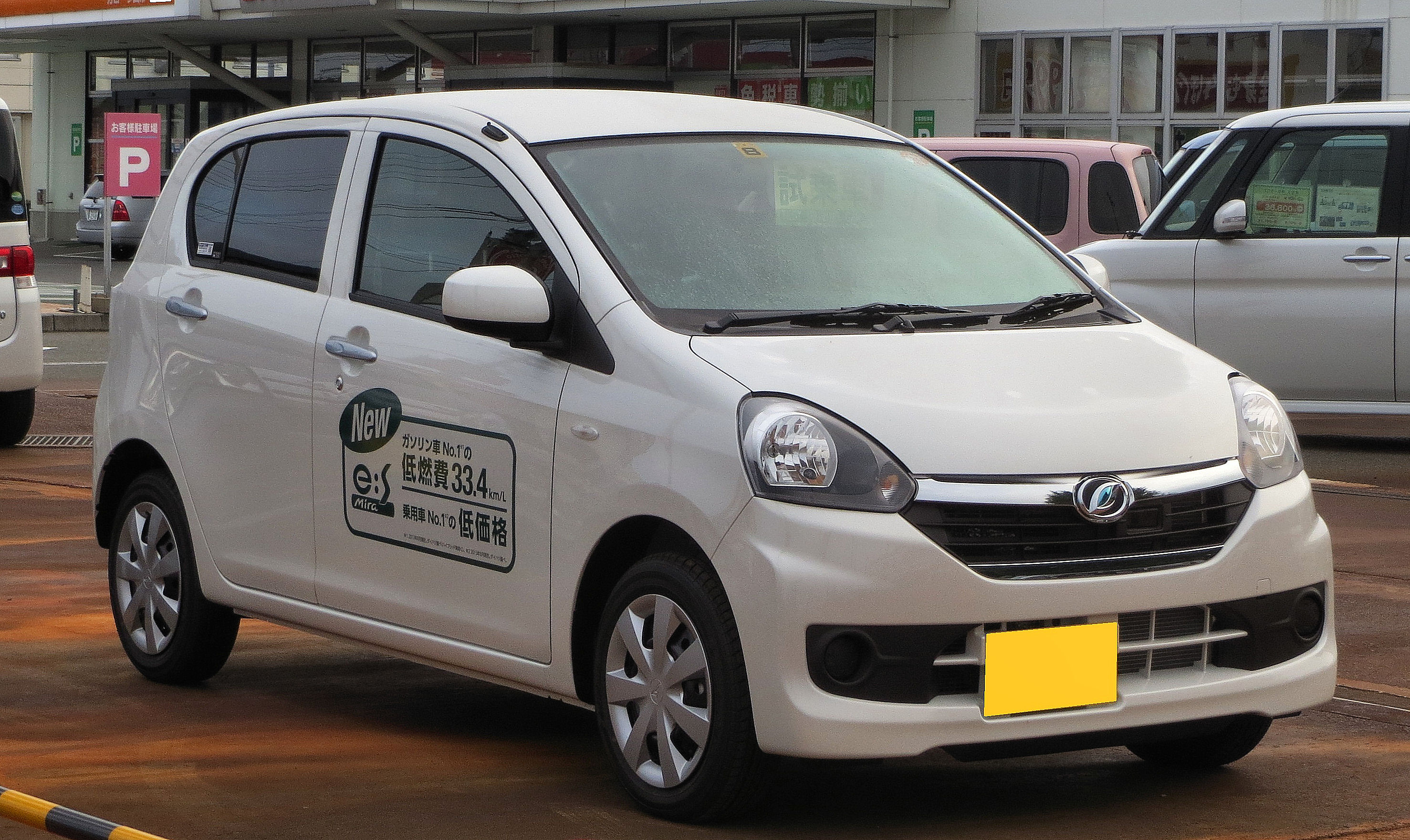 ダイハツ ミラ イース Xf "SA"